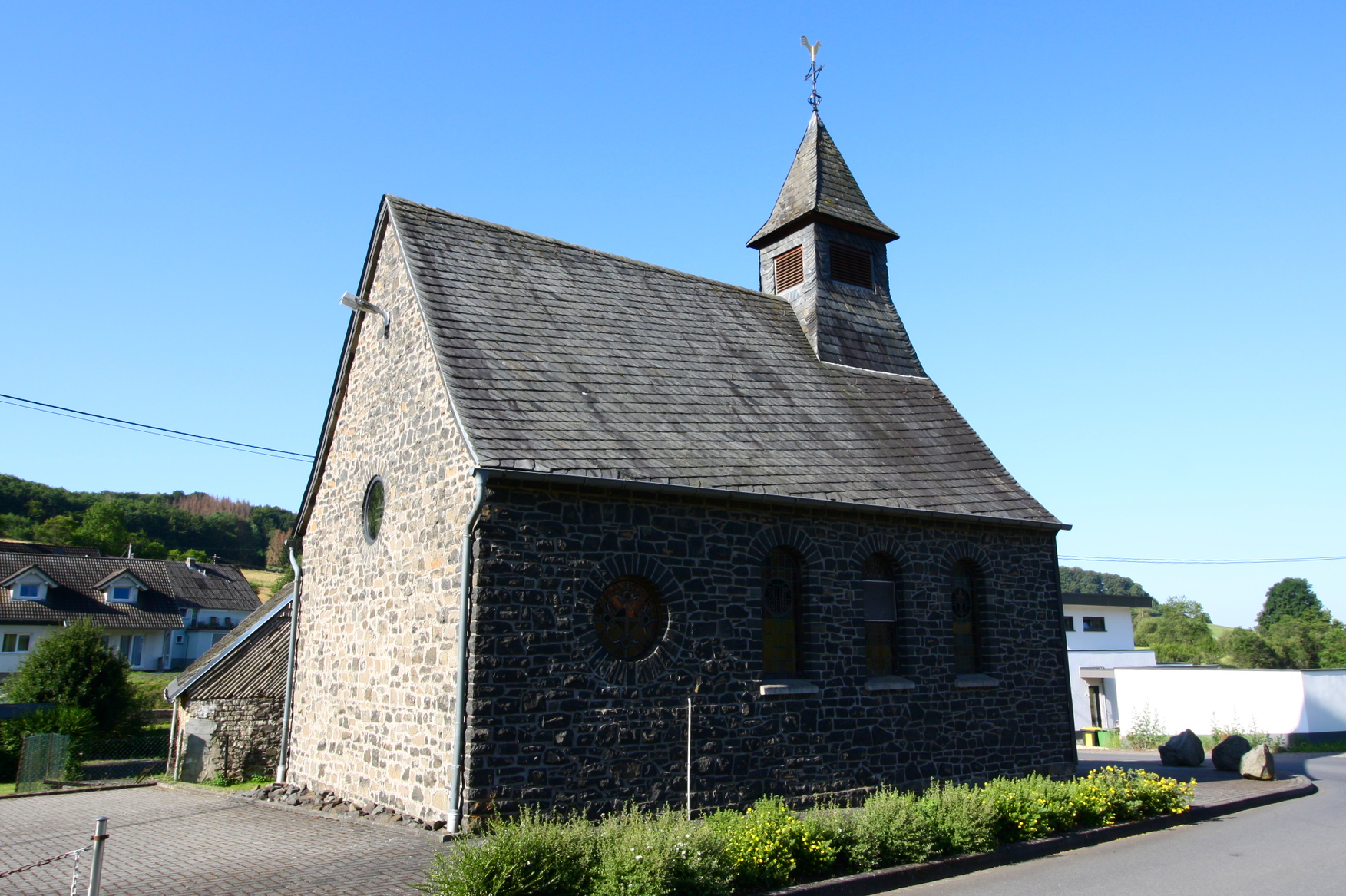 St. Apollonia, Karnhöfen, Ortsteil von Niedersayn, Westerwald, Rheinland-Pfalz, Deutschland